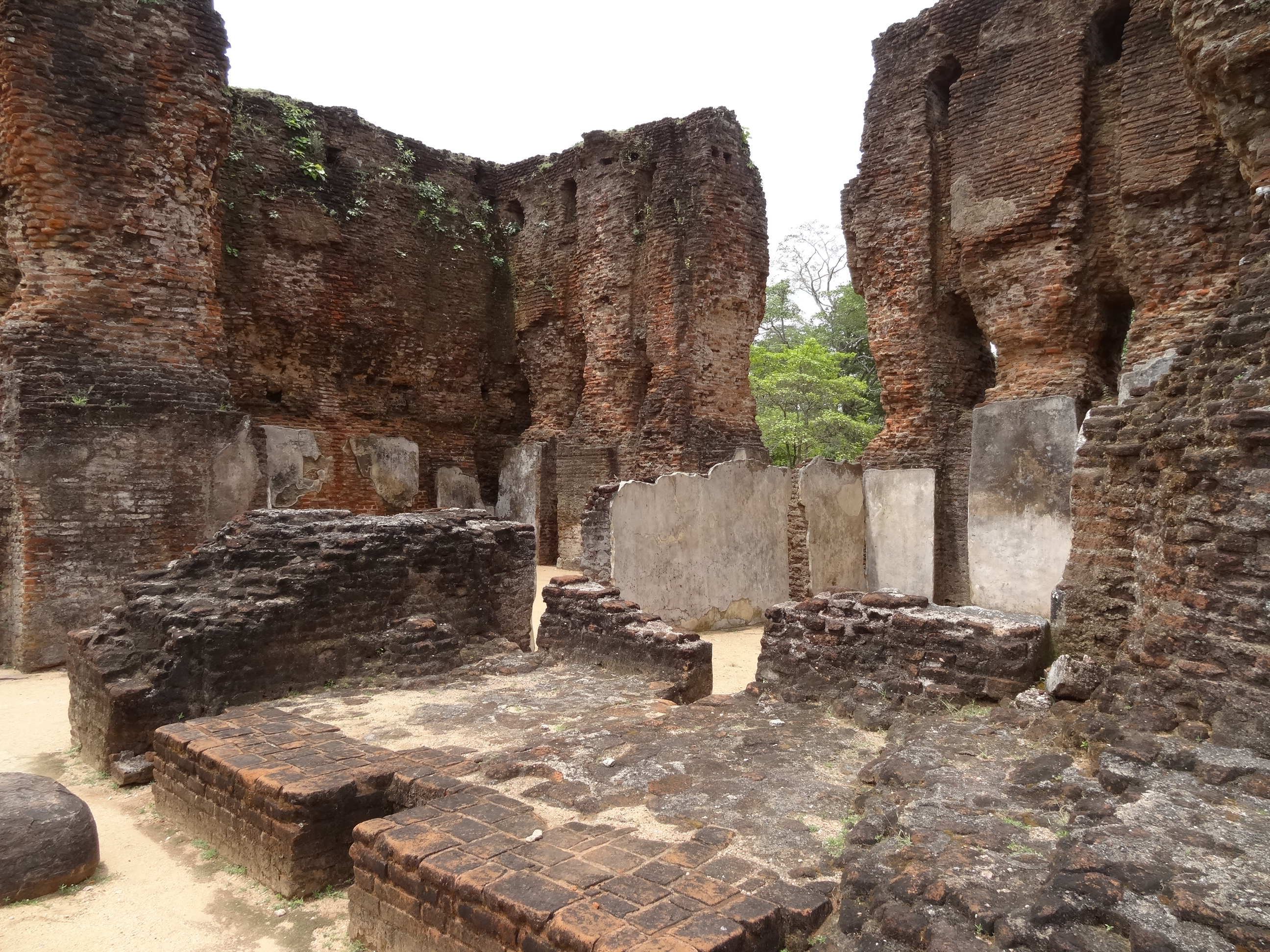 Royal Palace, Polonnaruwa